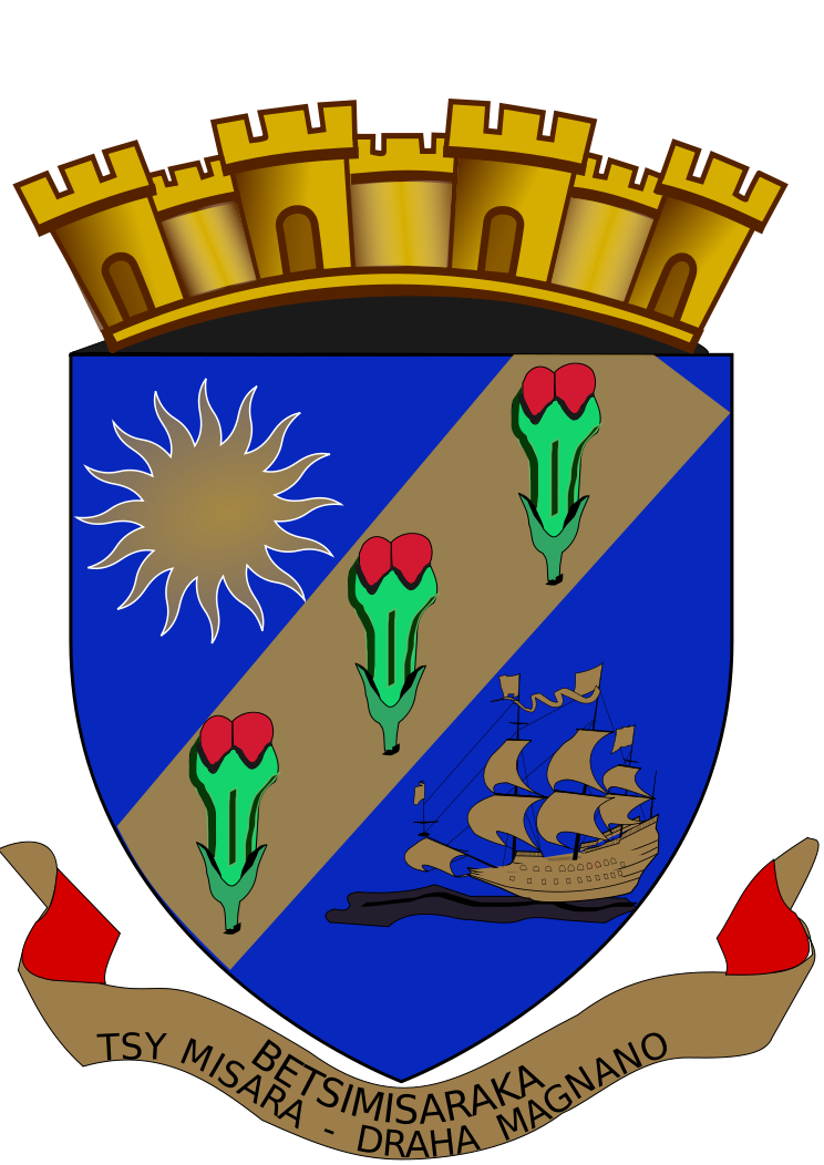 Blason de Fenoarivoatsinanana, Fenerive